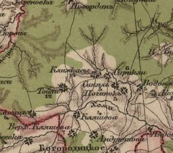 Село Климова (Климкасы) и ближайшие населённые пункты. «Специальная карта Европейской России»